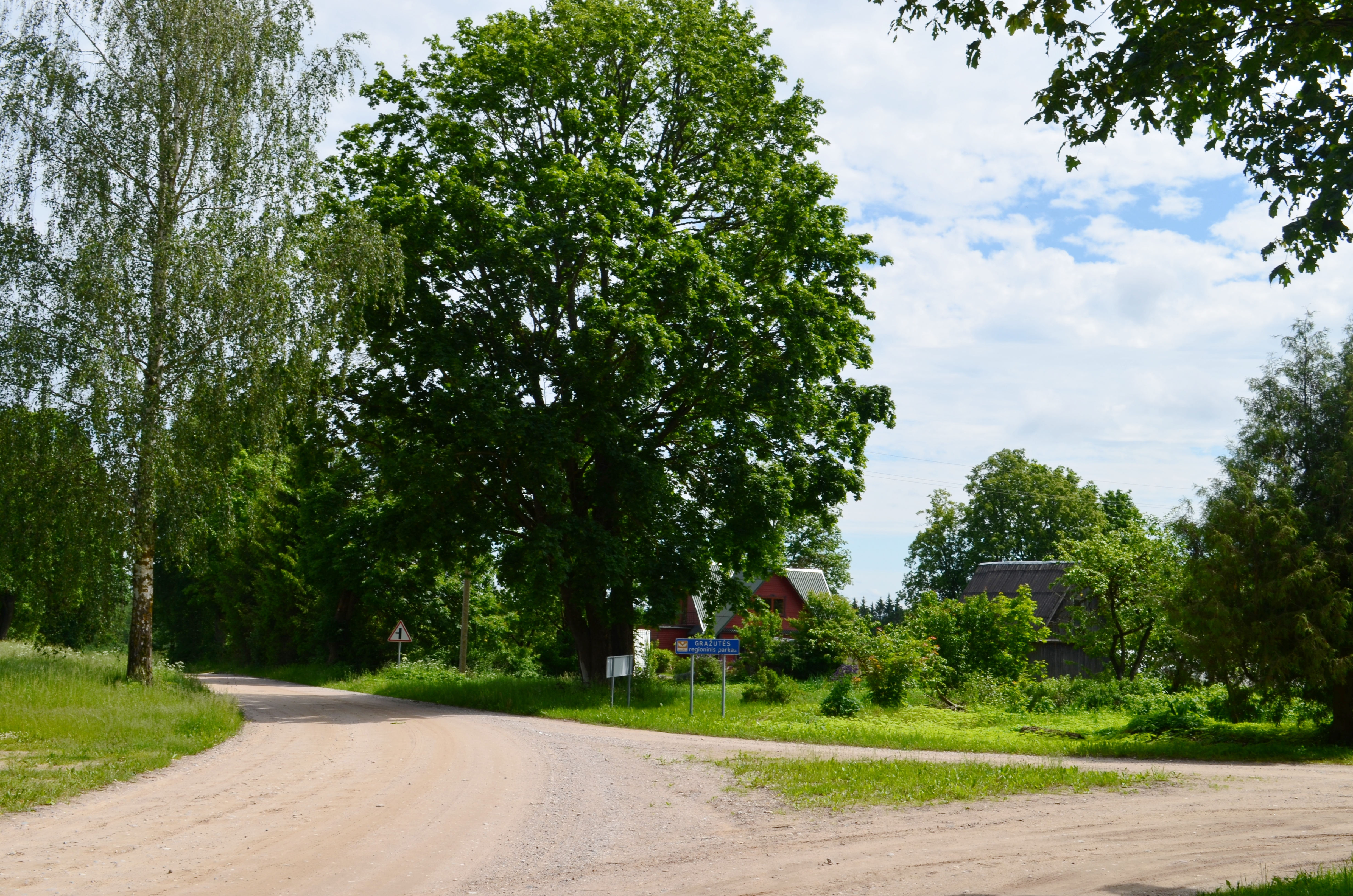 Aštrakalnis, Zarasų r.